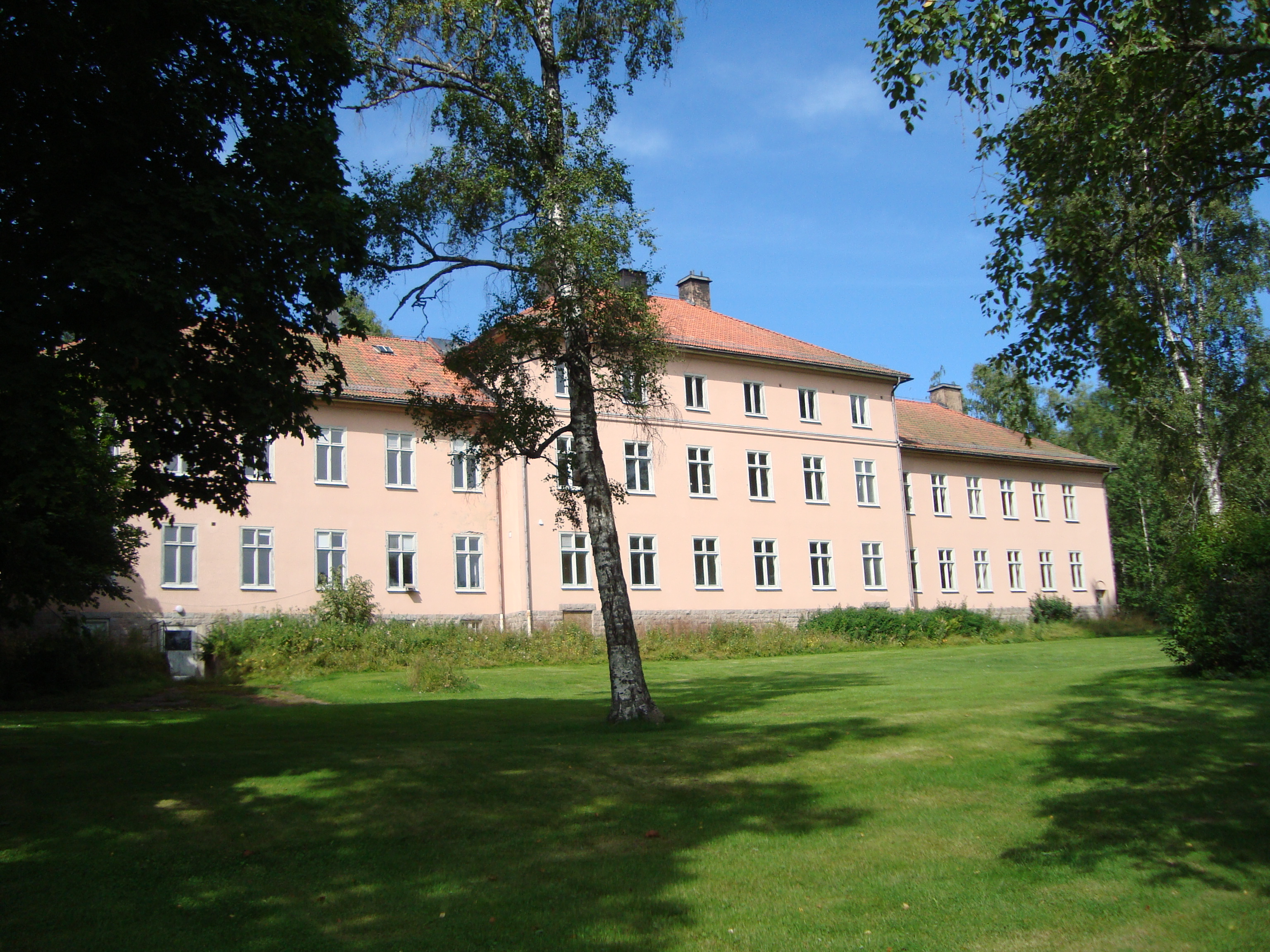 Old mental hospital ("Säters mentalsjukhus") area Skönvik, Säter, Sweden